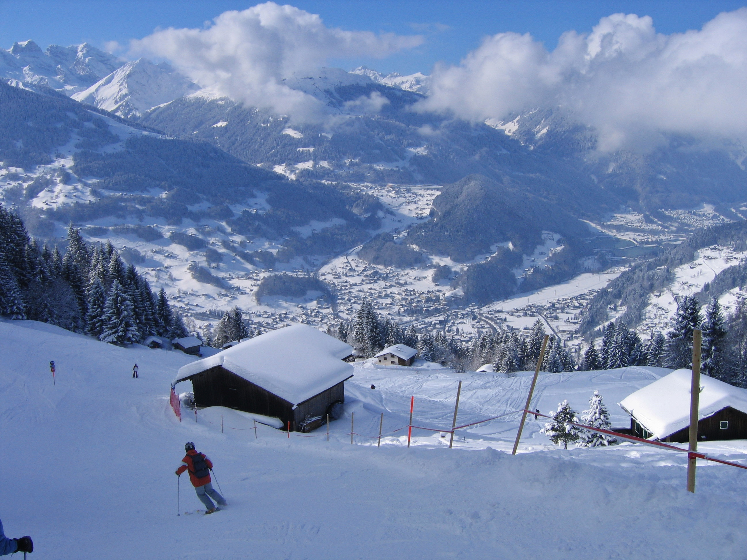 Skigebiet Silvretta Montafon